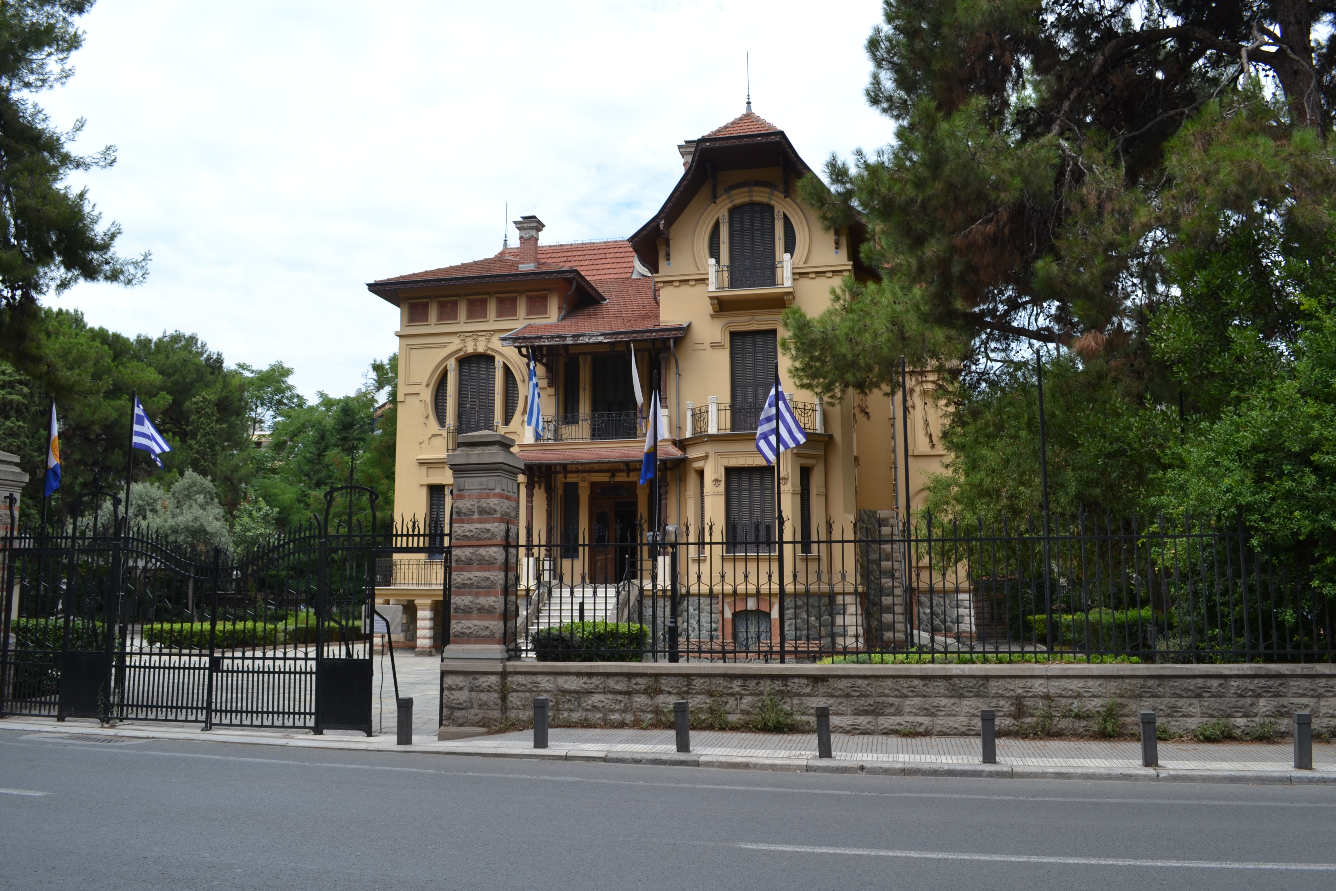 Κάζα Μπιάνκα, Θεσσαλονίκη«Κάζα Μπιάνκα»